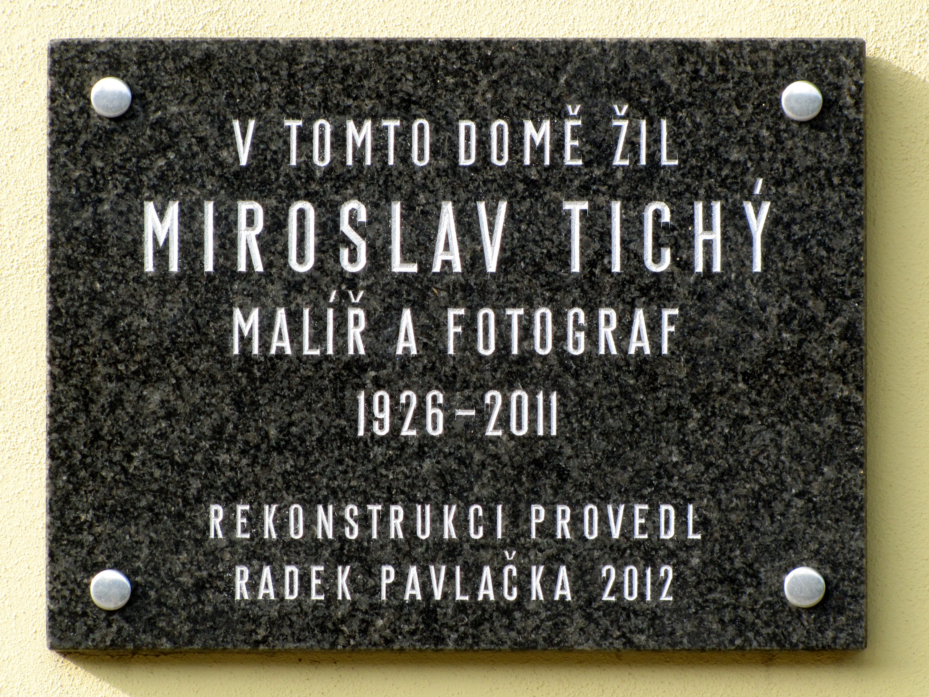 Pamětní deska na domě malíře a fotografa Miroslava Tichého v Kyjově